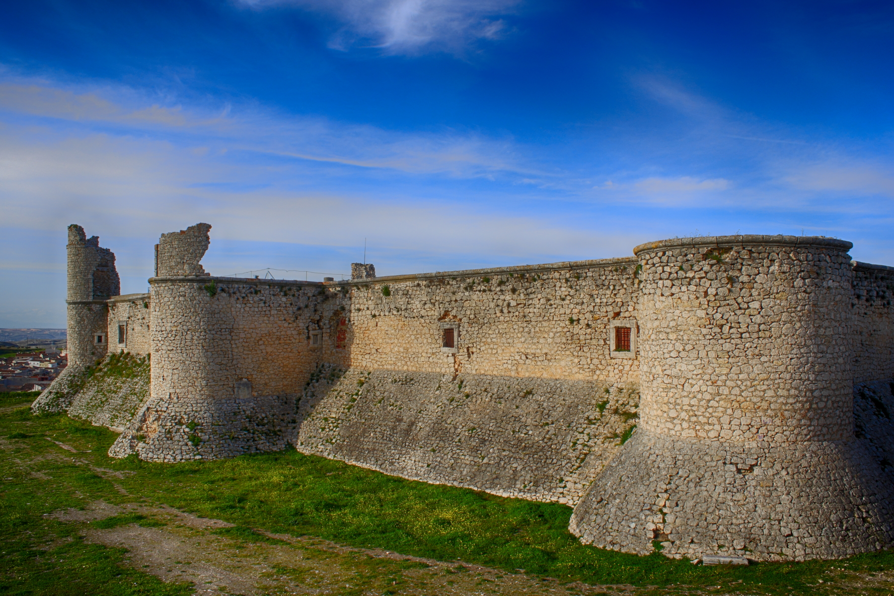 Castillo de los Condes, Siglo XV. Forma parte del Conjunto Histórico-Artístico de Chinchón según la declaración de 1974. Chinchón Comunidad de Madrid España